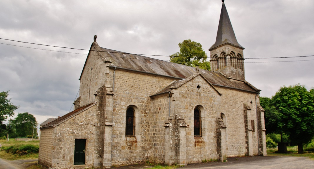 église St Jean-Baptiste